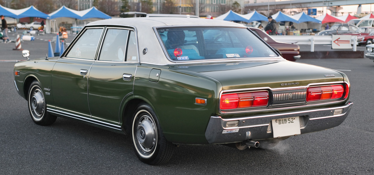 Nissan Cedric 2000 Deluxe ( 230 )